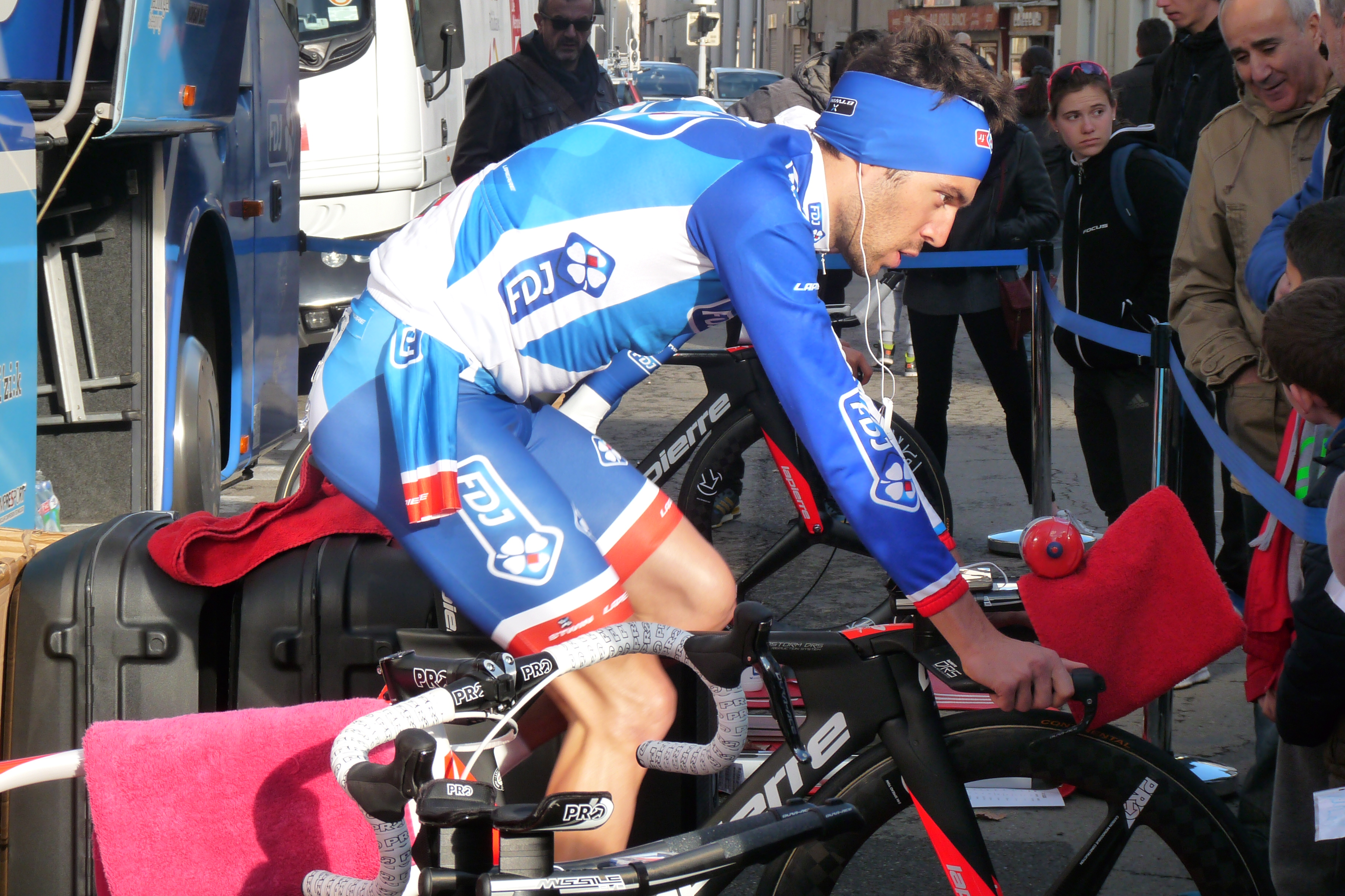 Thibaut Pinot à l'échauffement avant le contre la montre de l'Étoile de Bessèges 2016 Depicted person: Thibaut Pinot Depicted team: FDJ